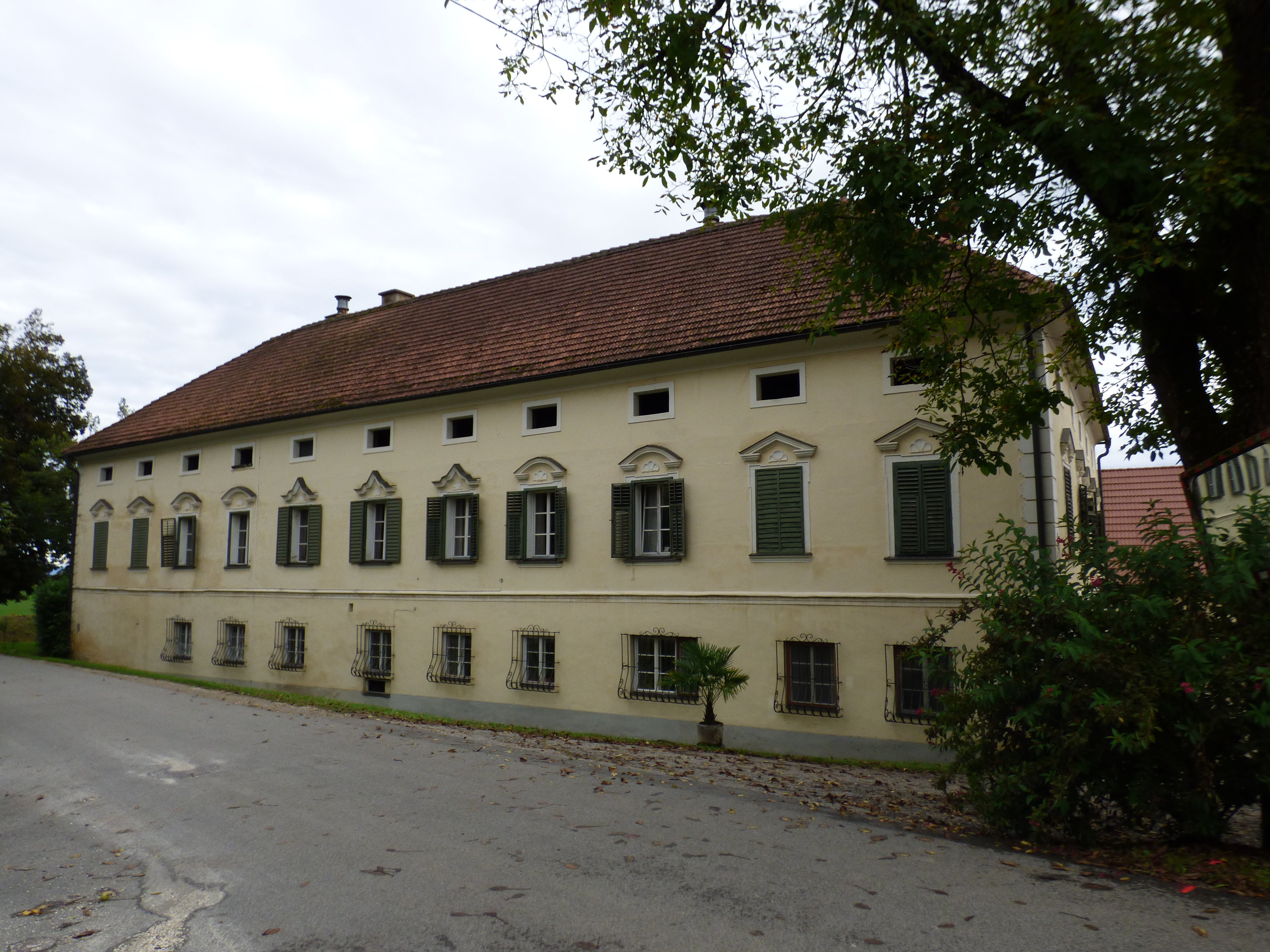 Schloss Gundersdorf (Gemeinde Magdalensberg, Kärnten). Nordseite